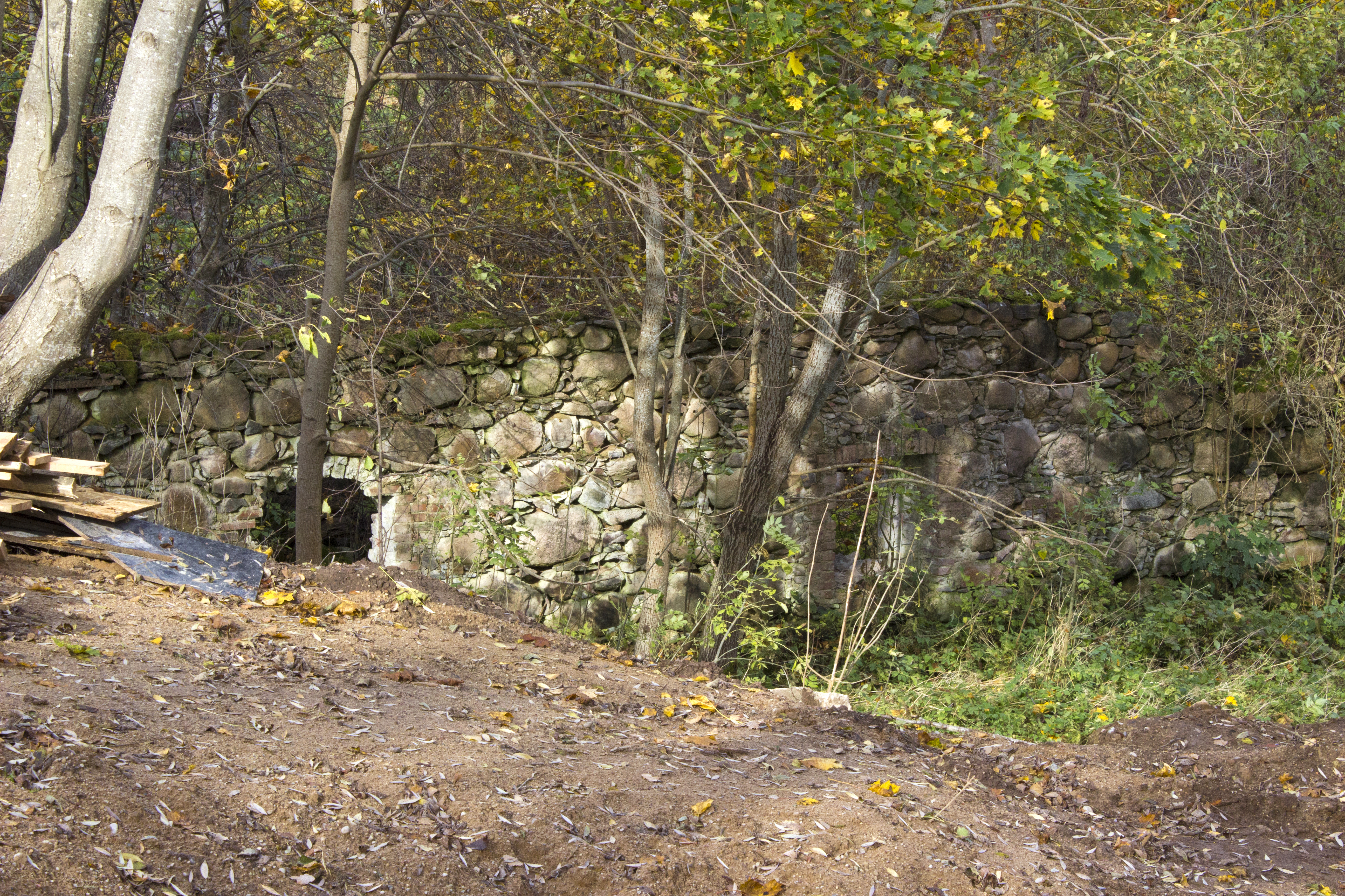 Pļavas dzirnavas